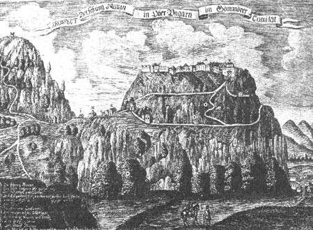 Муранский замок (Словакия)